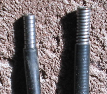 Confronto estetico tra guaina a spirale piatta e spirale rotonda